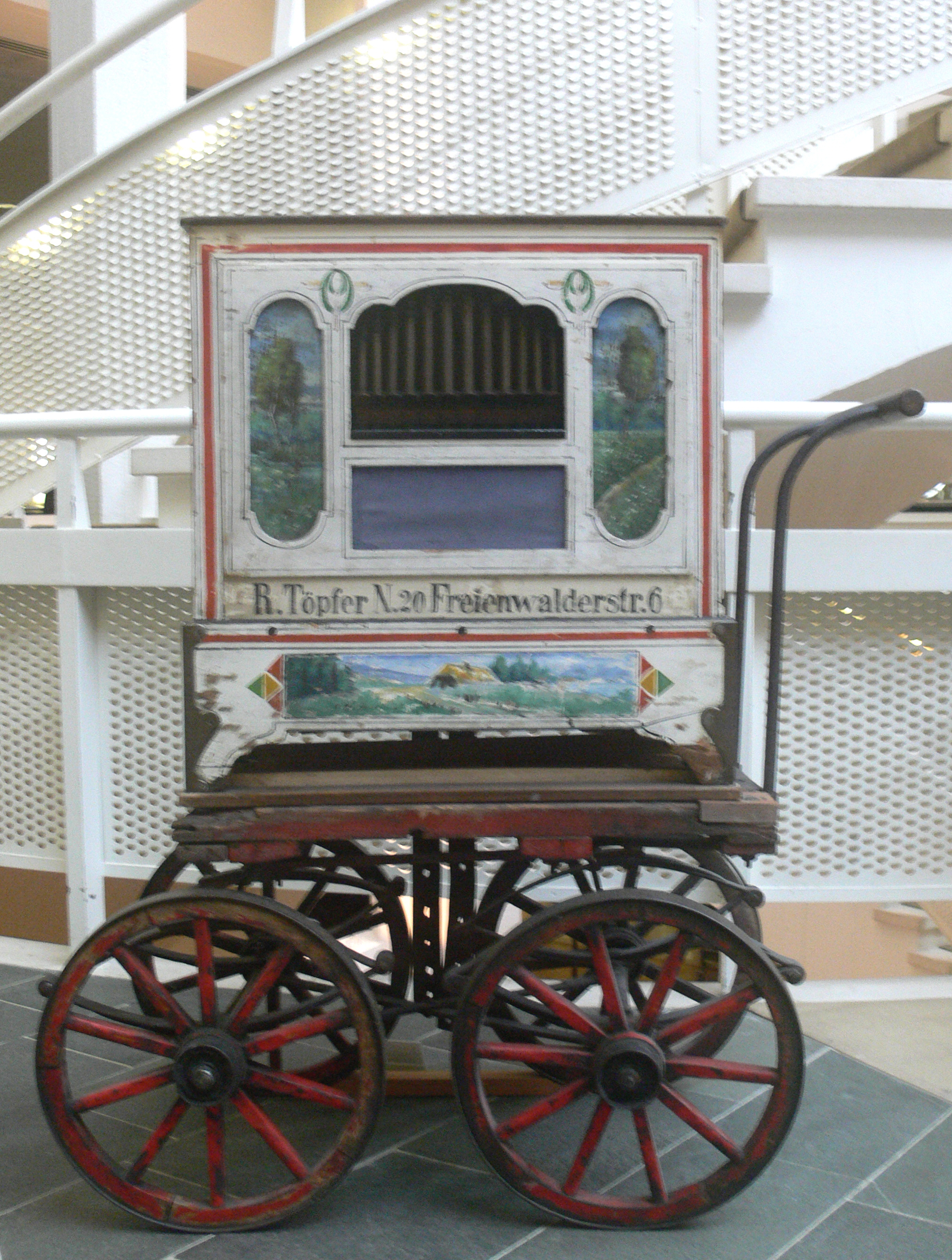 Musikinstrumenten-Museum Berlin Drehorgel, Berlin um 1900